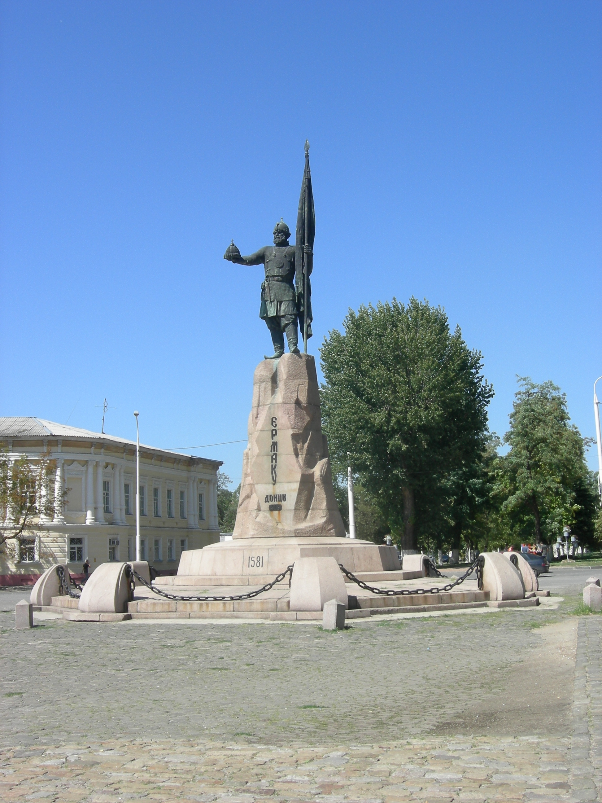 Статуя Ермака. г. Новочеркасск (Россия). Скульптор В.А. Беклемишев. 1904 год. Объект культурного наследия федерального значения. Возведён рядом с Вознесенским Кафедральным собором. Представляет огромную гранитную глыбу, оттёсанную под дикий камень, на которой возвышается четырёхметровая бронзовая фигура донского героя Ермака Тимофеевича. В левой руке он держит древко ратного знамени, а в правой — корону символизирующую покорённое Сибирское царство, которое он преподносит государству Российскому.